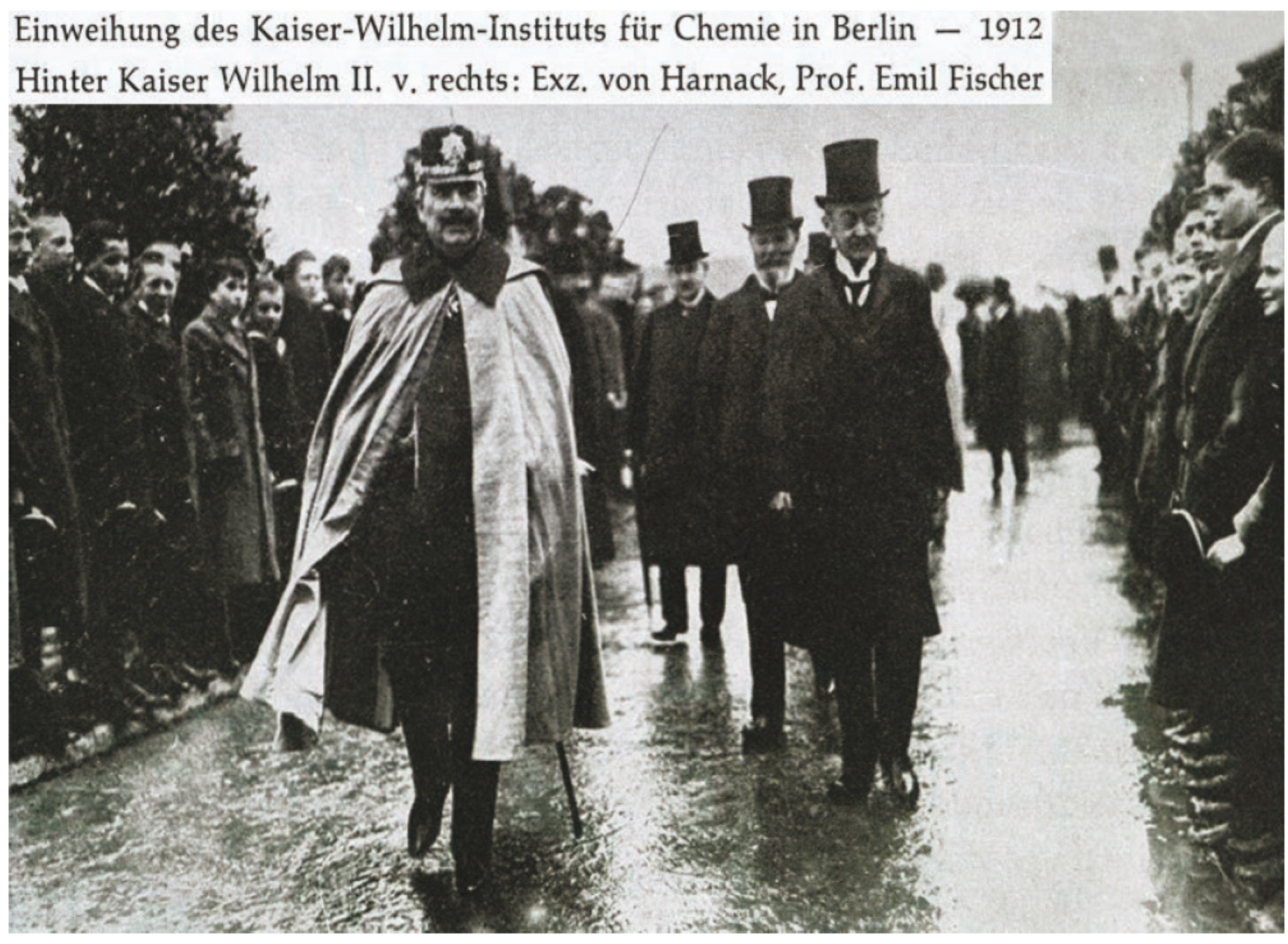 Gemeinsame Einweihung des Kaiser Wilhelm Instituts für Chemie und des KWI für physikalische Chemie und Elektrochemie in Dahlem (nach 11 Monaten Bauzeit). V.l.n.r. : Kaiser Wilhelm II. Fritz Haber, Direktor des KWI für physikalische Chemie und Elektrochemie (mit Zylinder) Emil Fischer, Vorsitzender des Verwaltungsausschusses KWI (mit Zylinder) Adolf (von) Harnack, Präsident der Kaiser Wilhelm Gesellschaft (KWG) (mit Zylinder)